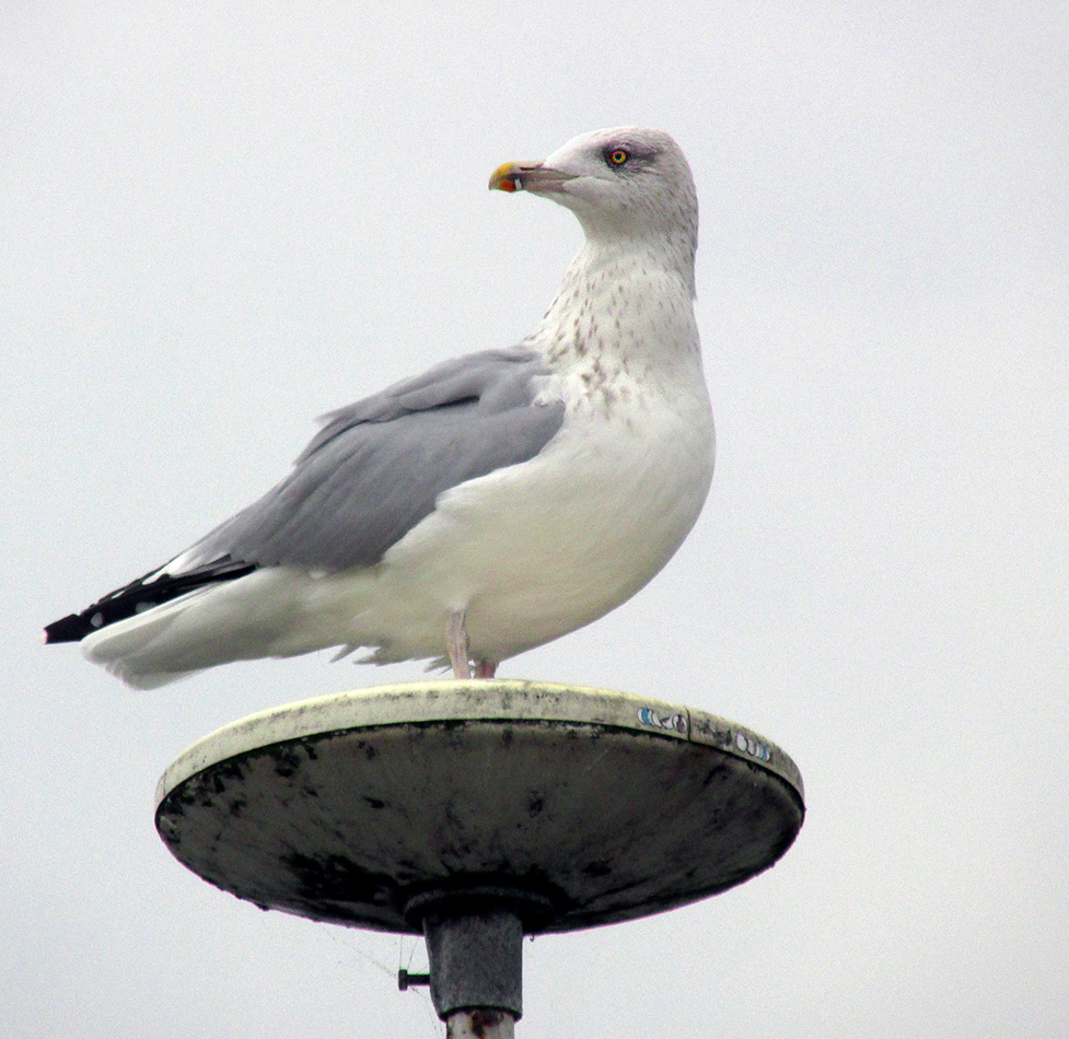 Vuxen Gråtrut i vinterdräkt.